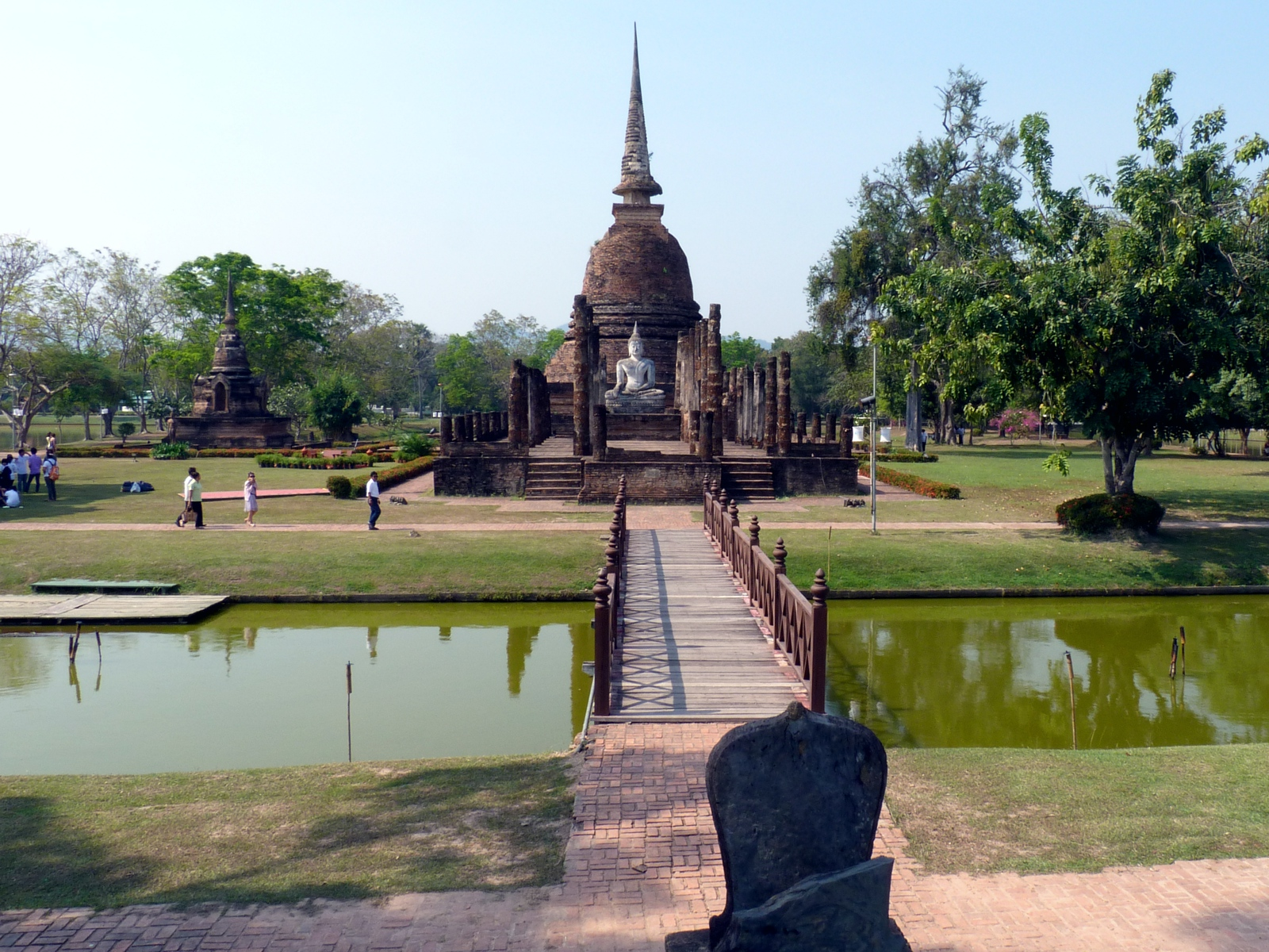 Blick auf Viharn und Chedi des Wat Sa Si vom Ubosot aus (im Geschichtspark Sukhothai, Thailand)